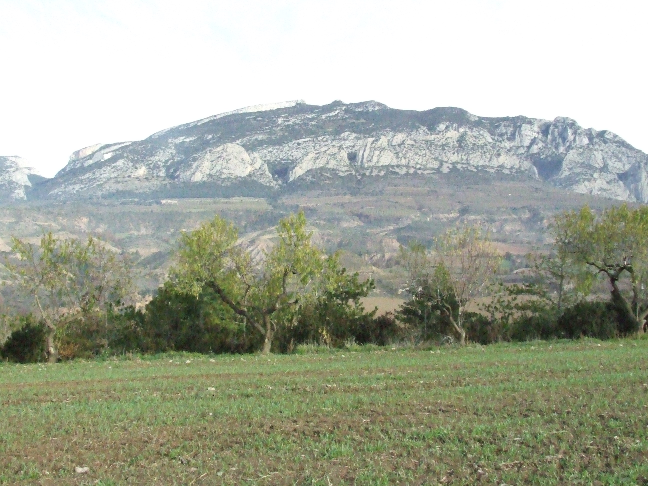 La Serra de Monteguida des de llevant (Abella de la Conca, Pallars Jussà)